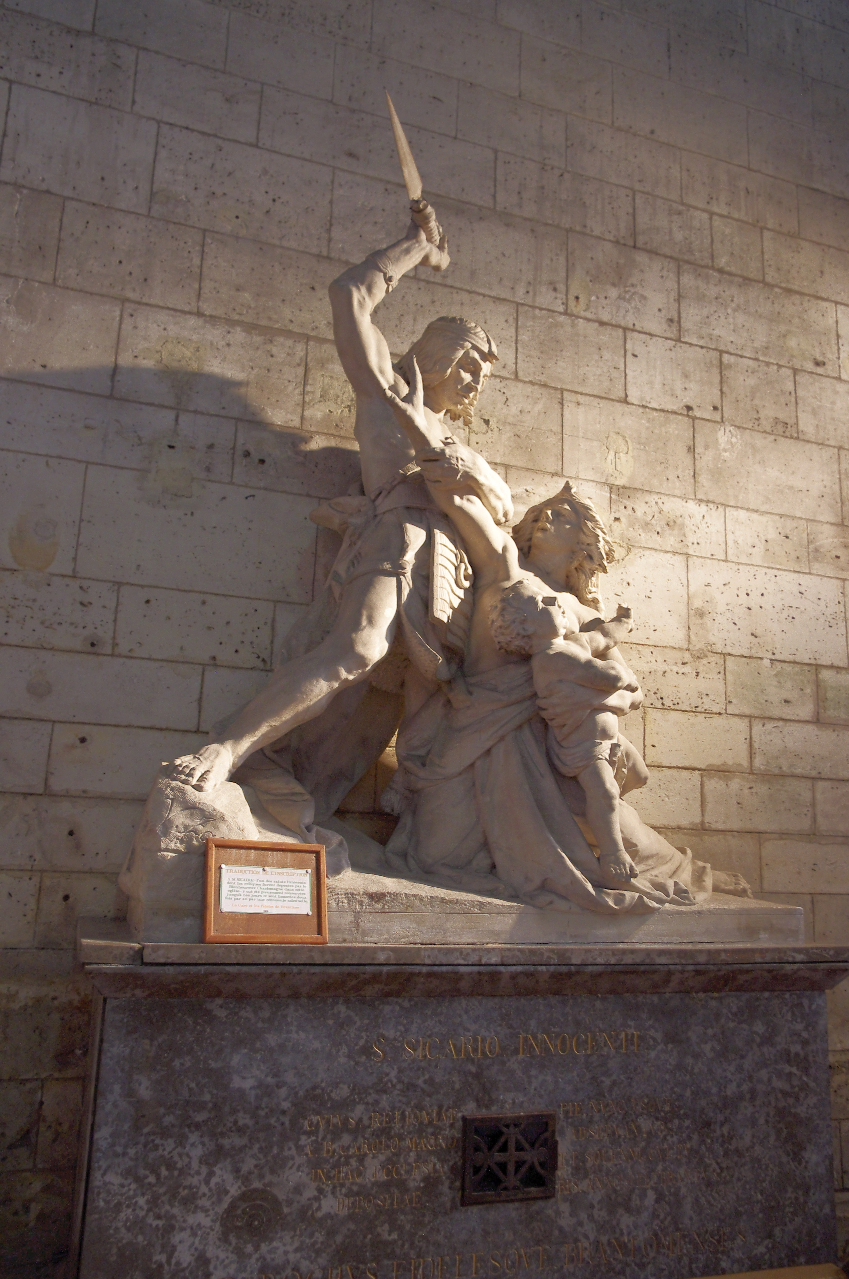 Brantôme - Sculpture de Saint-Sicaire dans l’Abbaye Saint-Pierre de Brantôme. L'oeuvre est datée du tout début du XXème siècle, et la femme qui protège l'un des saints innocents durant le Massacre des Innocents peut évoquer la figure de la marianne française (Rappel : les saints innocents sont les enfants de moins de 2 ans tués sur l'odre d'Hérode selon la Bible).. deux bas-reliefs de bois, dans le coeur de l'abbatiale évoquent aussi ce sujet. Saint-Sicaire est le patron de la commune. Un os de son crâne aurait été confié aux premiers moines de Brantôme par Charlemagne, et est toujours présent dans le reliquaire de l'abbatiale.